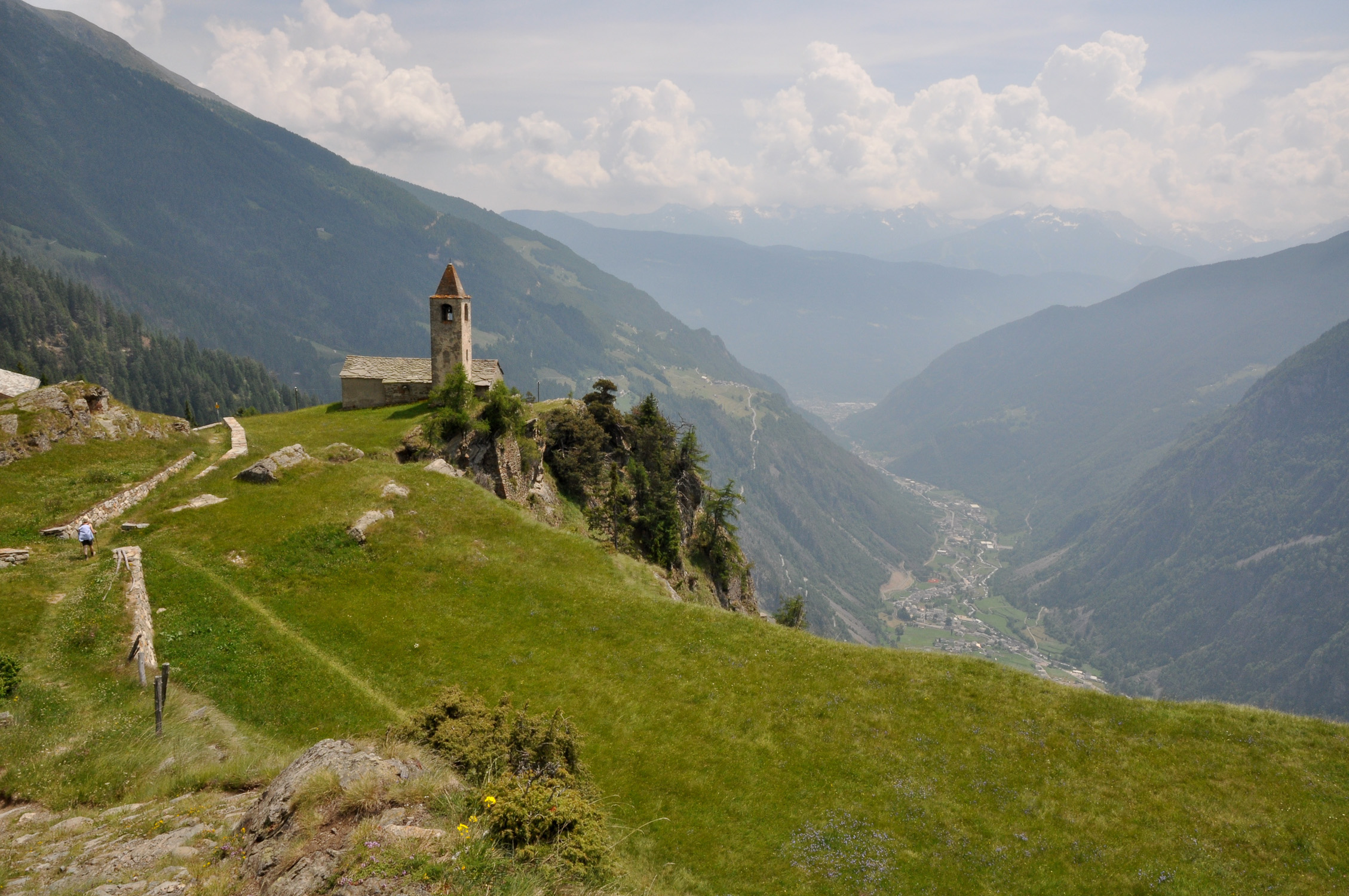 Kirche San Romerio, Brusio 1793m, Blick von Norden Richtung Tirano, Italien